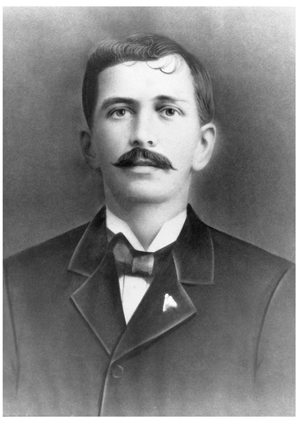 Retrato de Demetrio H. Brid